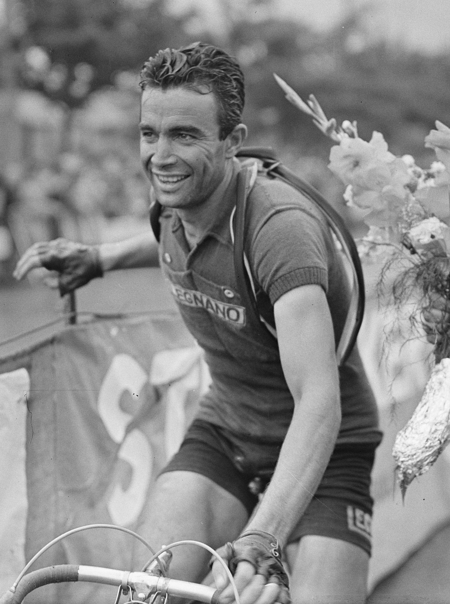 Tour de France, de winnaar van de 2e etappe (Reims-Luik), Adolfo Leoni (Italië).